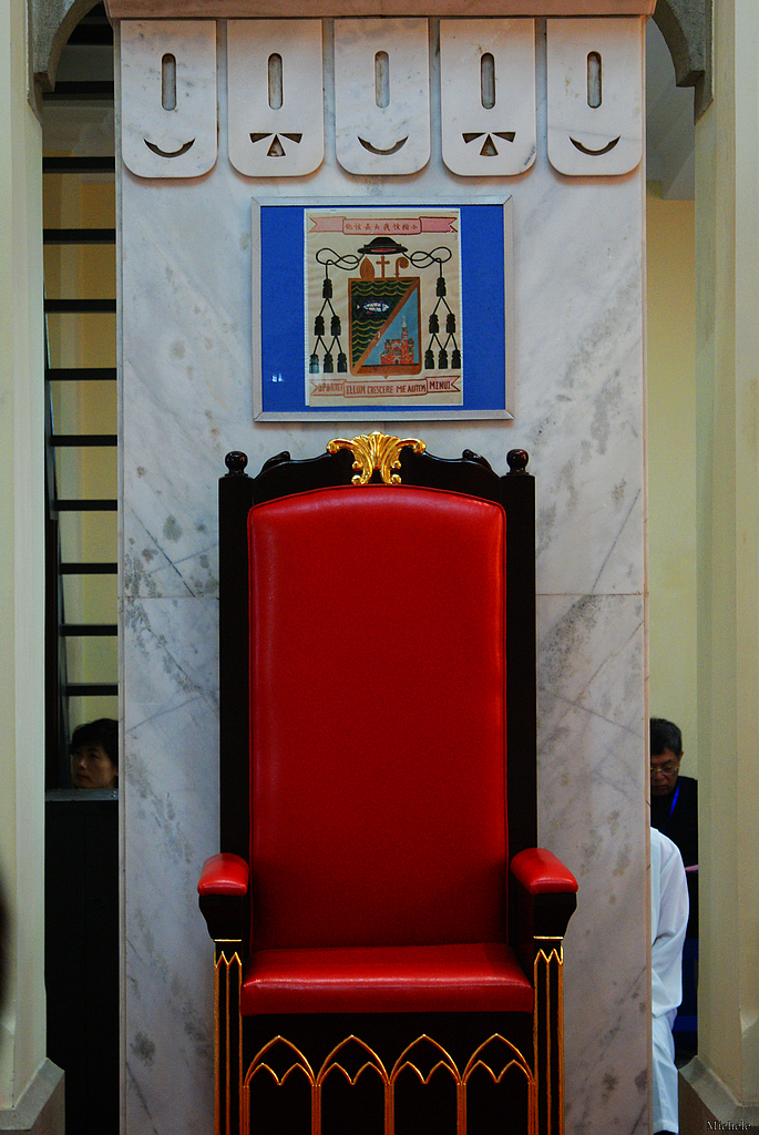 佘山進教之佑聖母大殿主教寶座